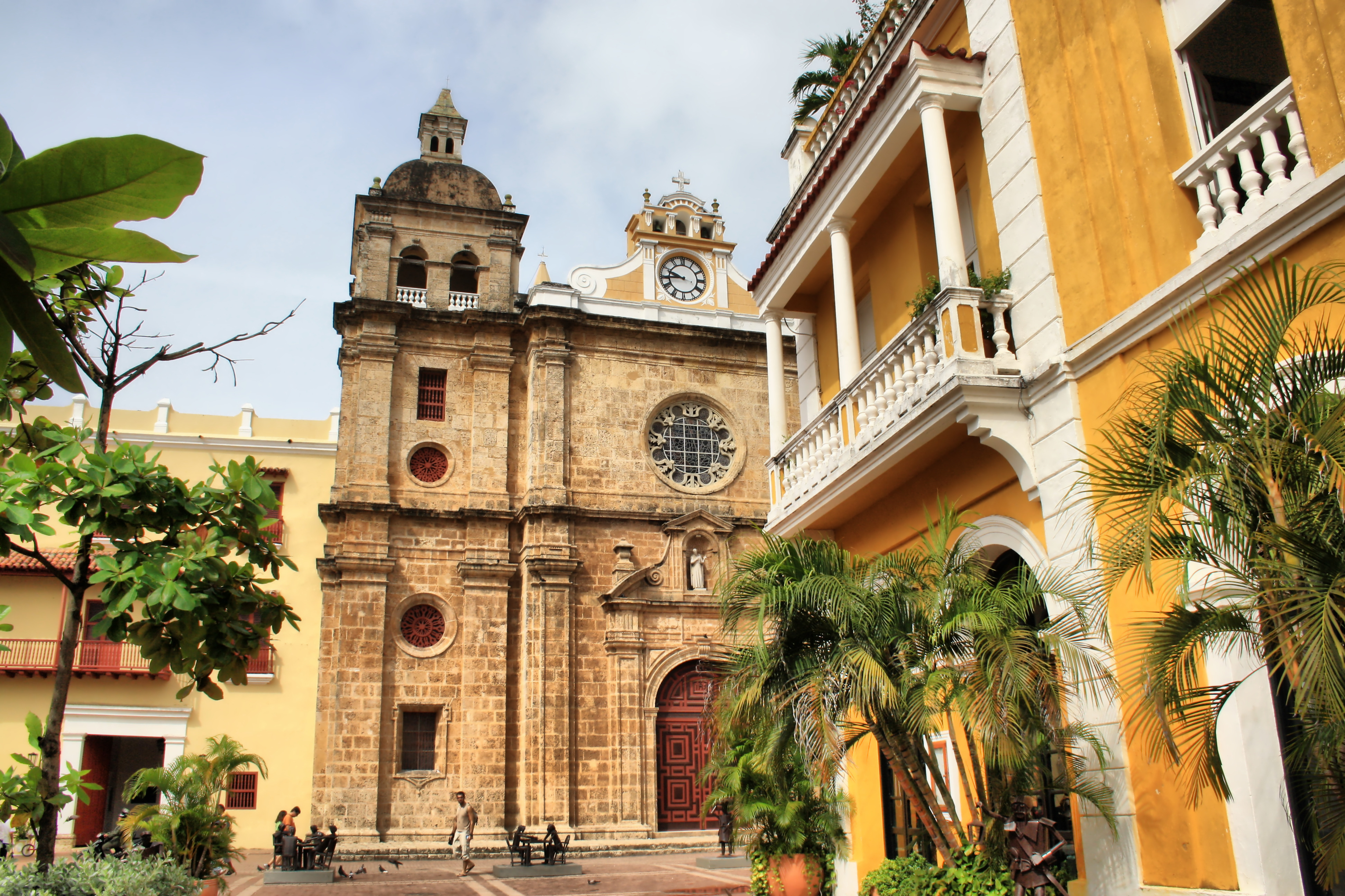 Iglesia y Claustro de San Pedro Claver